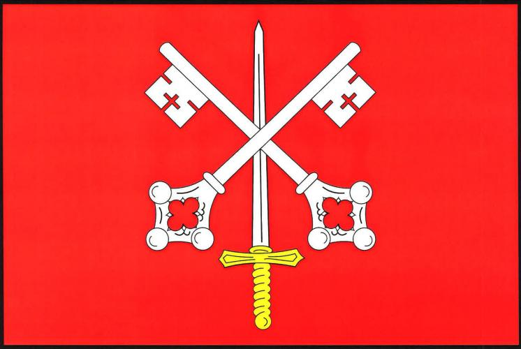 Bělčice vlajka